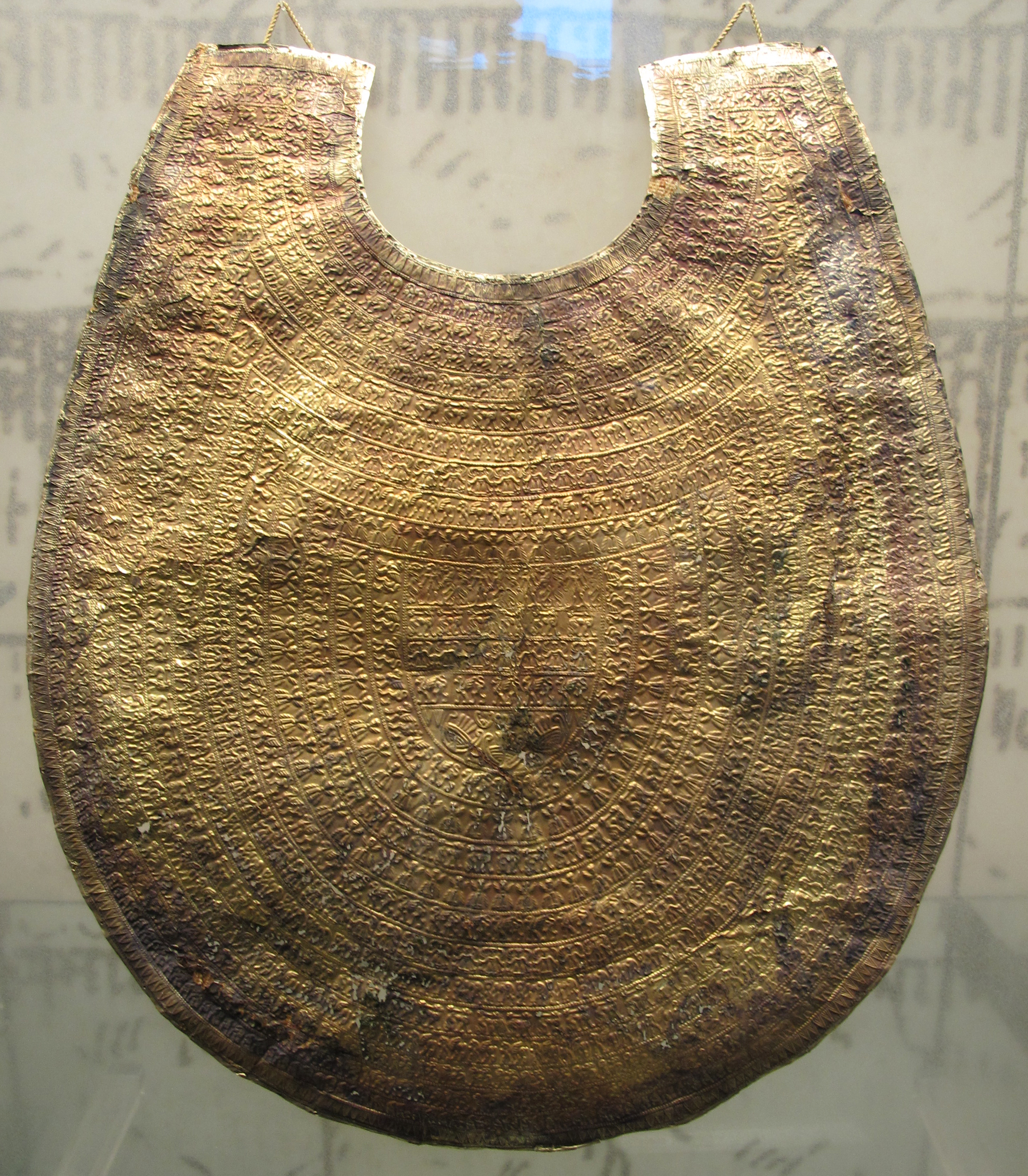 Museo Gregoriano Etrusco